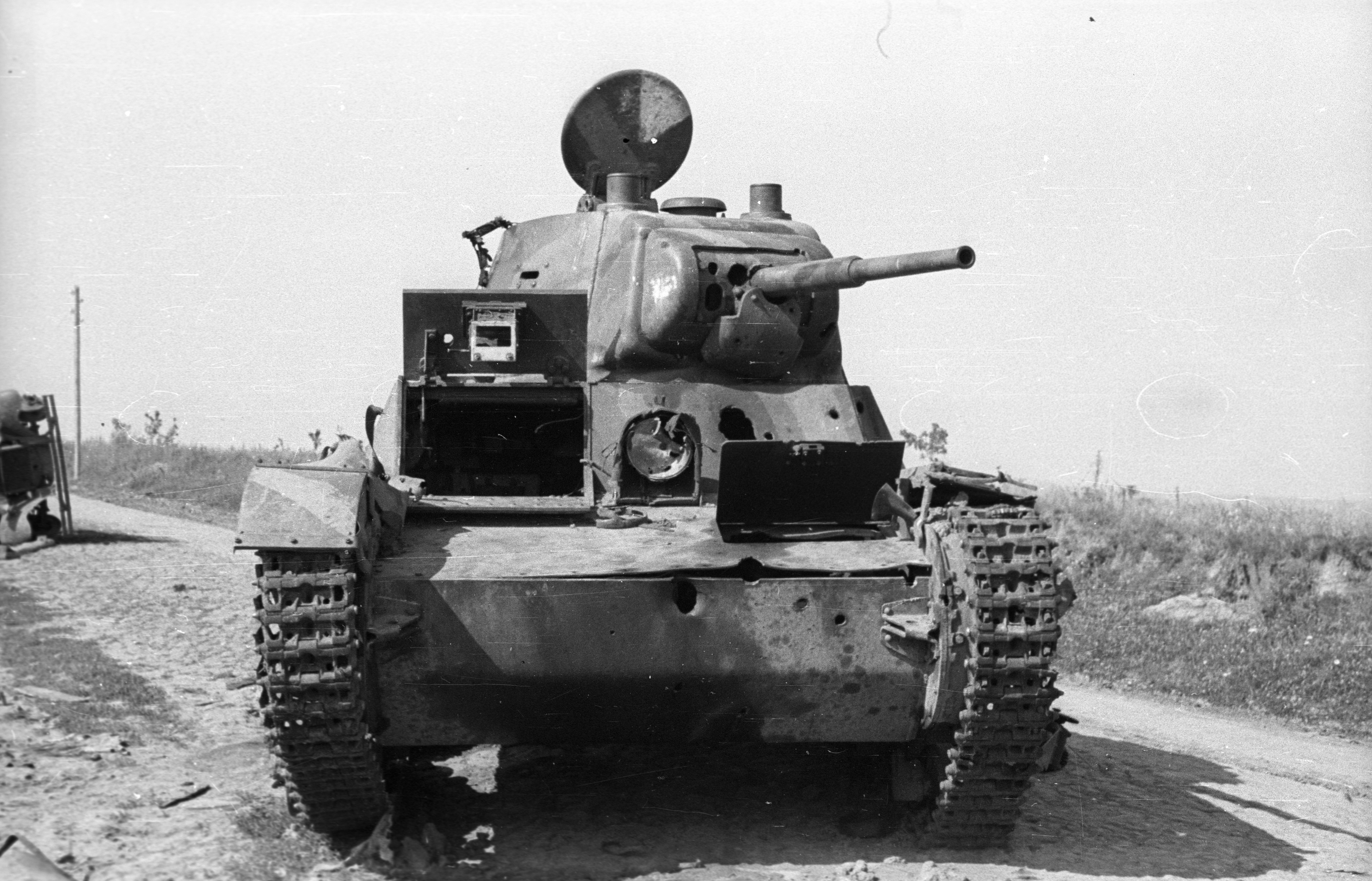 kilőtt T-26-os harckocsi a Kamenyec-Podolszk és Tulcsin közötti úton. Location: Ukraine Tags: tank, wreck, Soviet brand Title: kilőtt T-26-os harckocsi a Kamenyec-Podolszk és Tulcsin közötti úton.